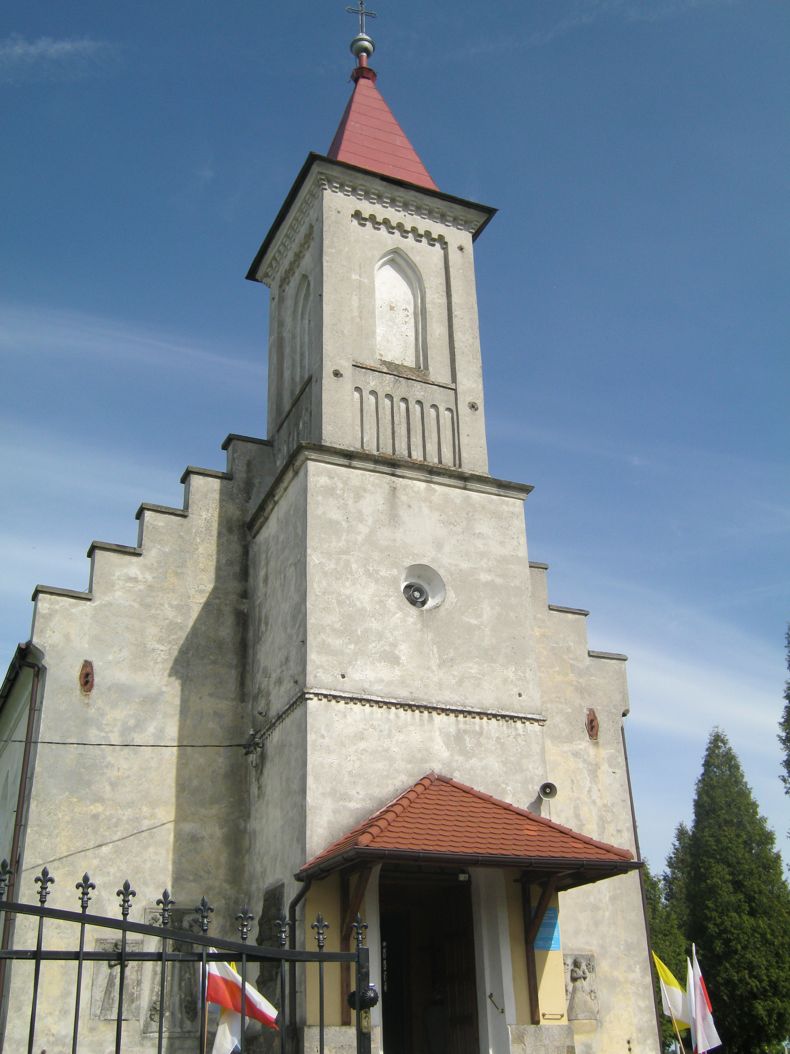 Kościół w Iwinach.